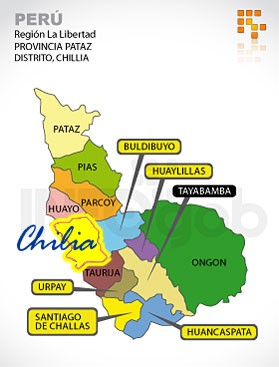 Mapa Político de Pataz y su Distrito de Chillia